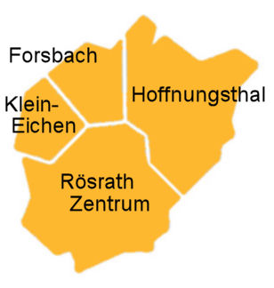 Rösrath Stadtteile Übersicht